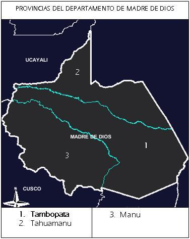 División política de Madre de Dios. mdd prov. dd